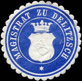 Sealing stamp Title: Magistrat zu Delitzsch Description: blau, weiß, geprägt Place: Delitzsch size: 4 cm